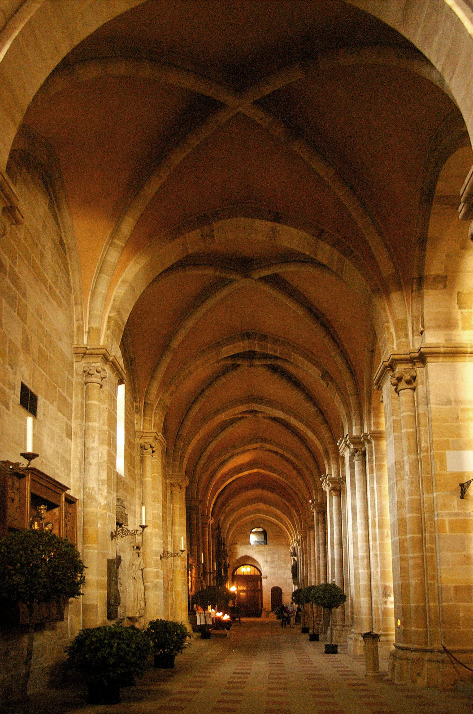 Bamberg Dom - Seitenschiff